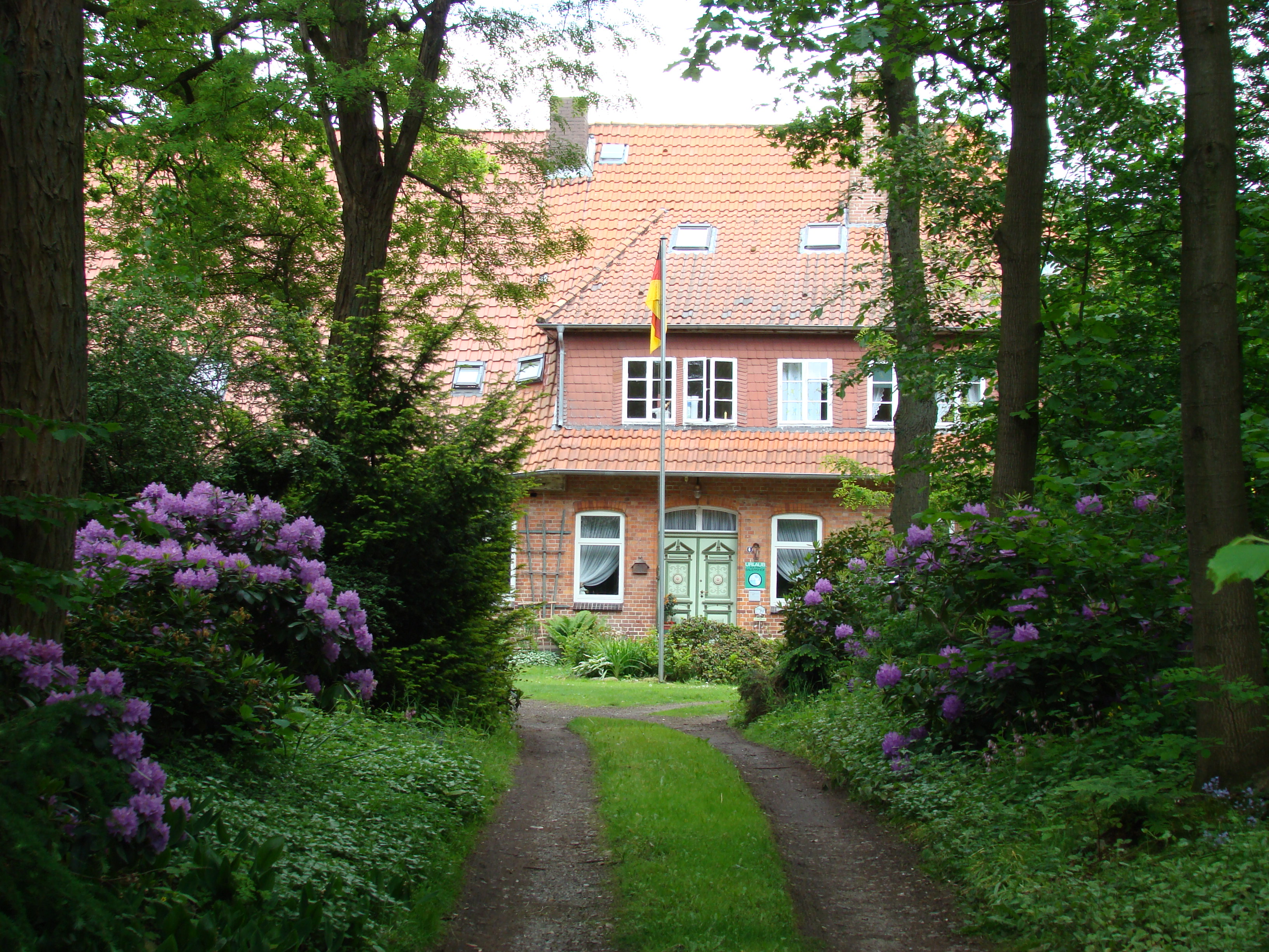 Bauernhof in Poitzen, Gemeinde Faßberg in Lower Saxony